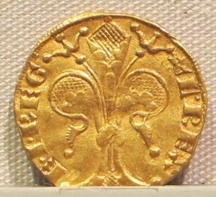 Palazzo Massimo alle Terme